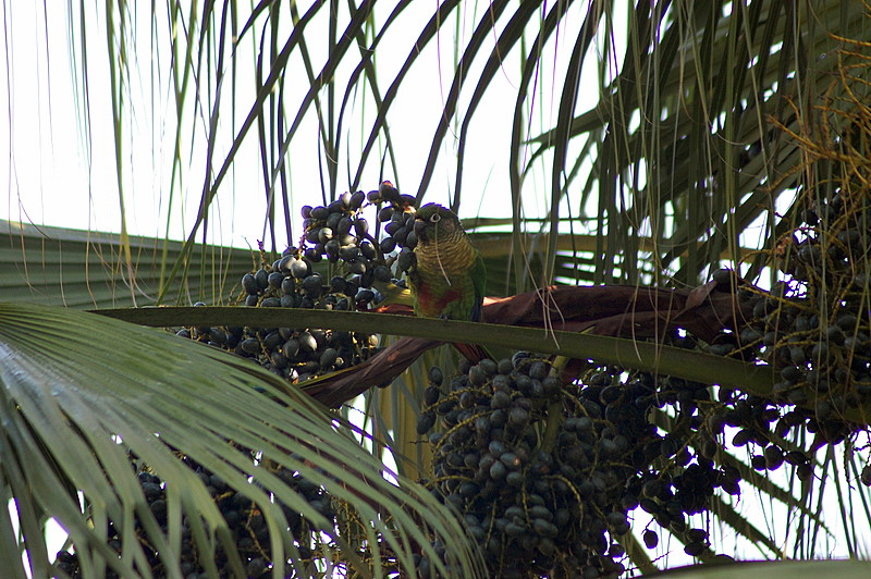 Jardim Botânico de São Paulo